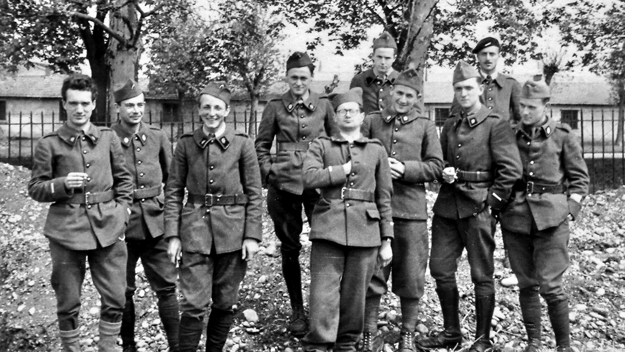 Le Docteur Michel Bommelaer au début de la guerre 1939-1945